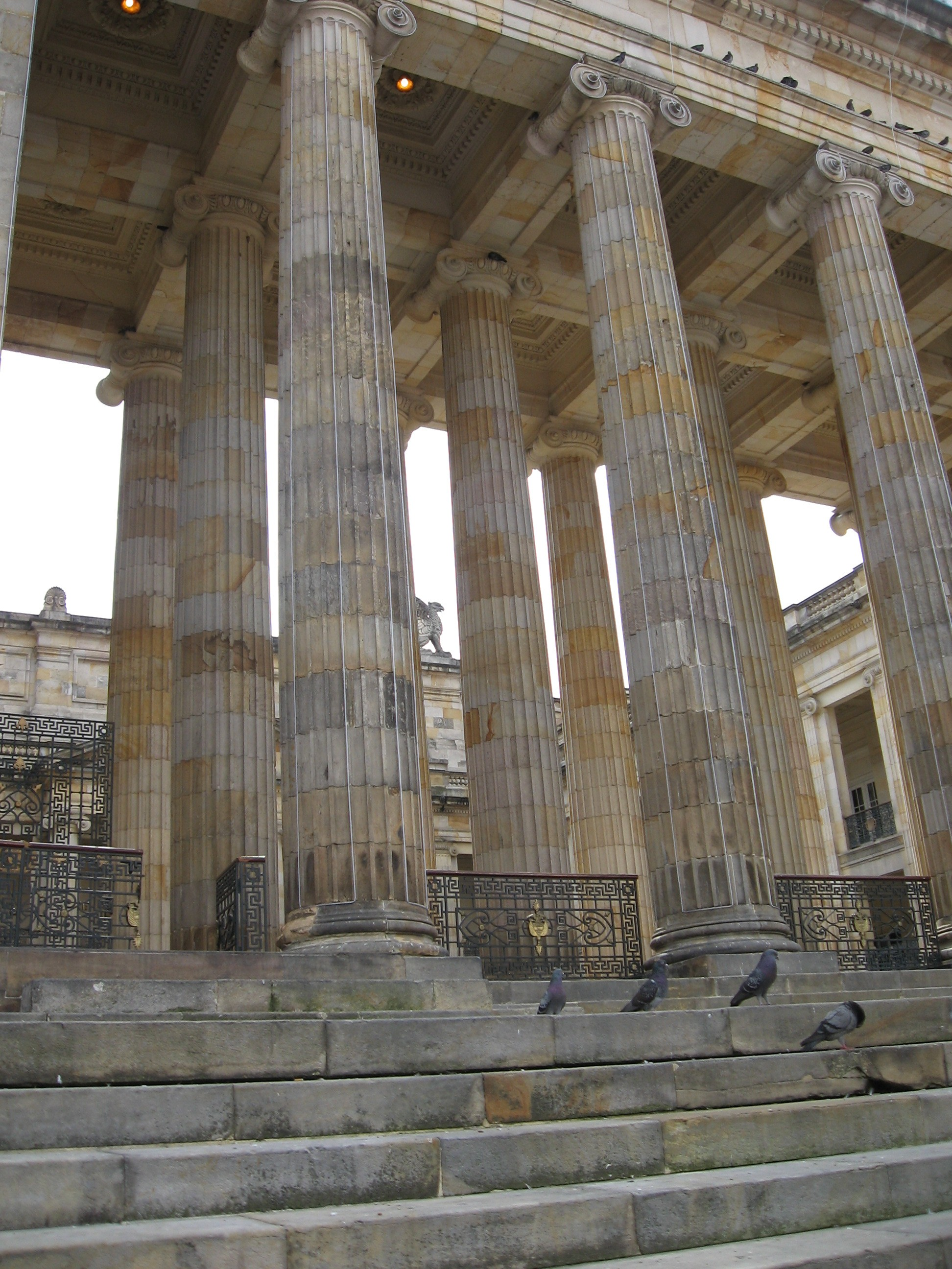 Capitolio Nacional, detalle 2007